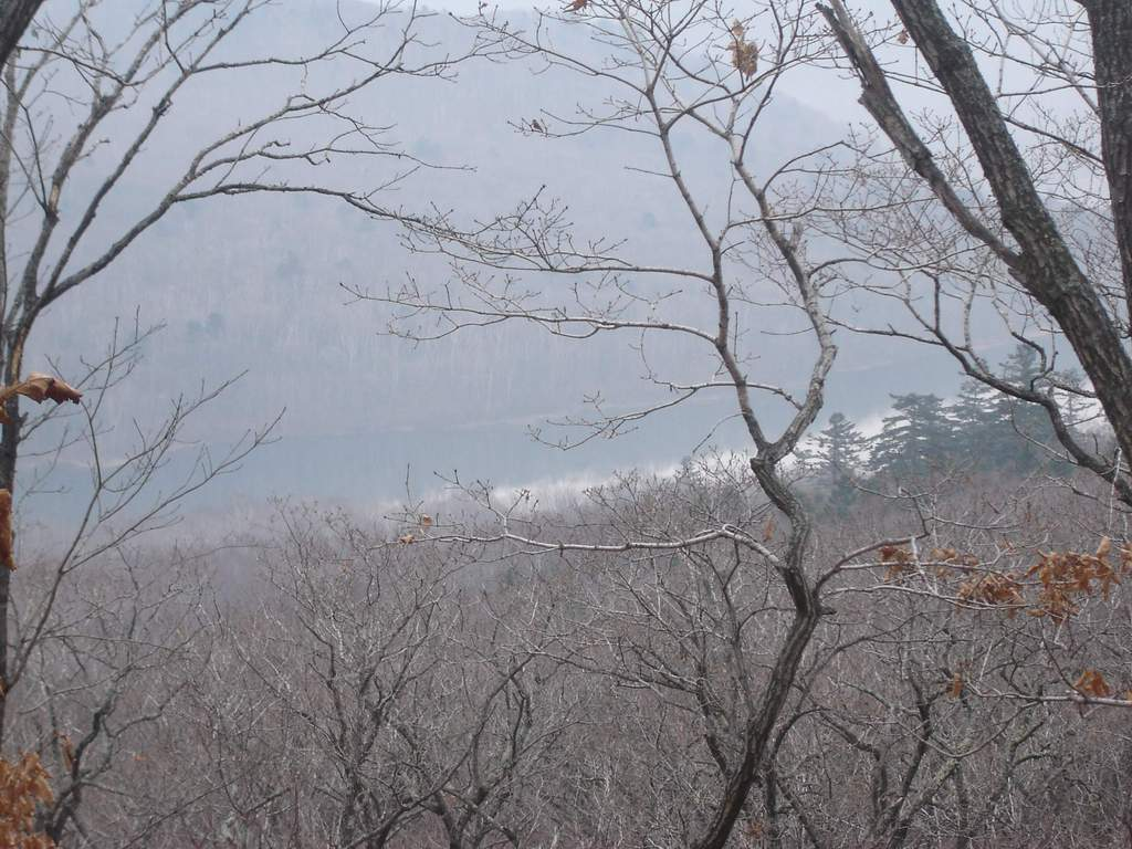 Во владивостокском ботаническом саду поздней осенью.